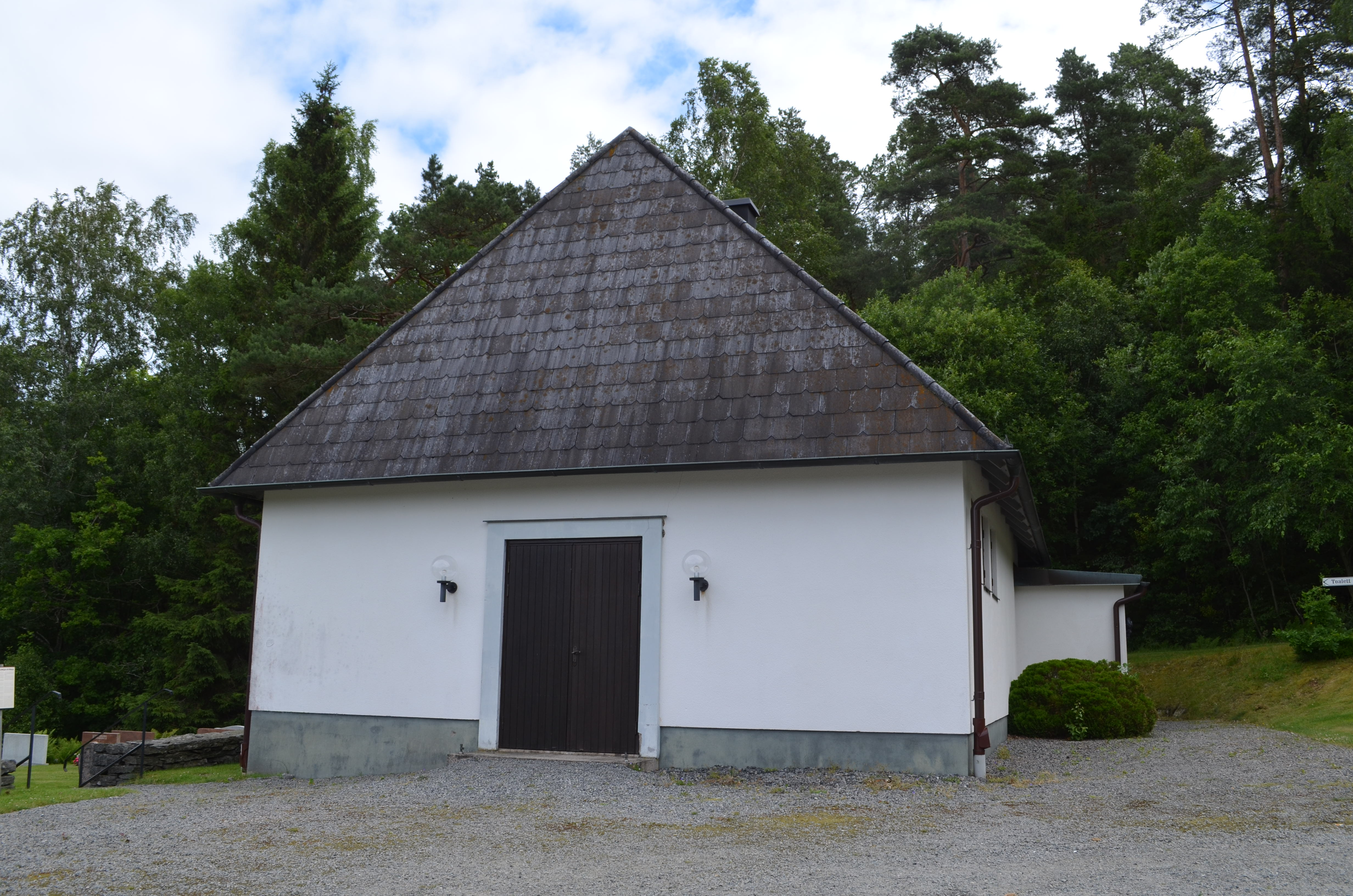 Kattunga kapell